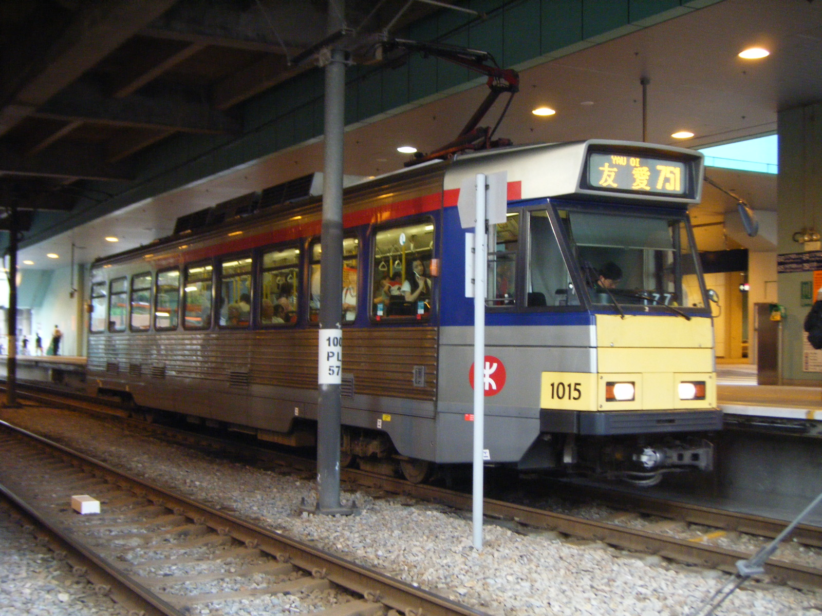 中文（香港）: 一列輕鐵列車正在輕鐵兆康站中停站。